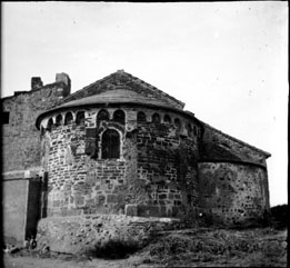 Fonds Trutat - Photographie ancienne Cote : TRU C 2266 Localisation : Fonds ancien (S 30) Original non communicable Titre : Eglise, Castel Ruscino, Perpignan, septembre 1909 Auteur : Trutat, Eugène Rôle de l’auteur : Photographe Lieu de création : Castel Ruscino (Perpignan) Date de création : 1909 Mesures : : 4,5 x 5,5 cm Observations : Deux plaques. Note manuscrite de Trutat : " Castel Ruscino, église, septembre 1909 ". Mot(s)-clé(s) : -- Eglise -- Abside -- Machicoulis -- Pierre -- Perpignan (Pyrénées-Orientales) -- Perpignan (Pyrénées-Orientales ; canton) -- Languedoc-Roussillon (France) -- Castel Ruscino (Perpignan) -- 20e siècle, 1e quart Médium : Photographies -- Négatifs sur plaque de verre -- Noir et blanc -- Vues d'architecture Bibliothèque de Toulouse. Domaine public